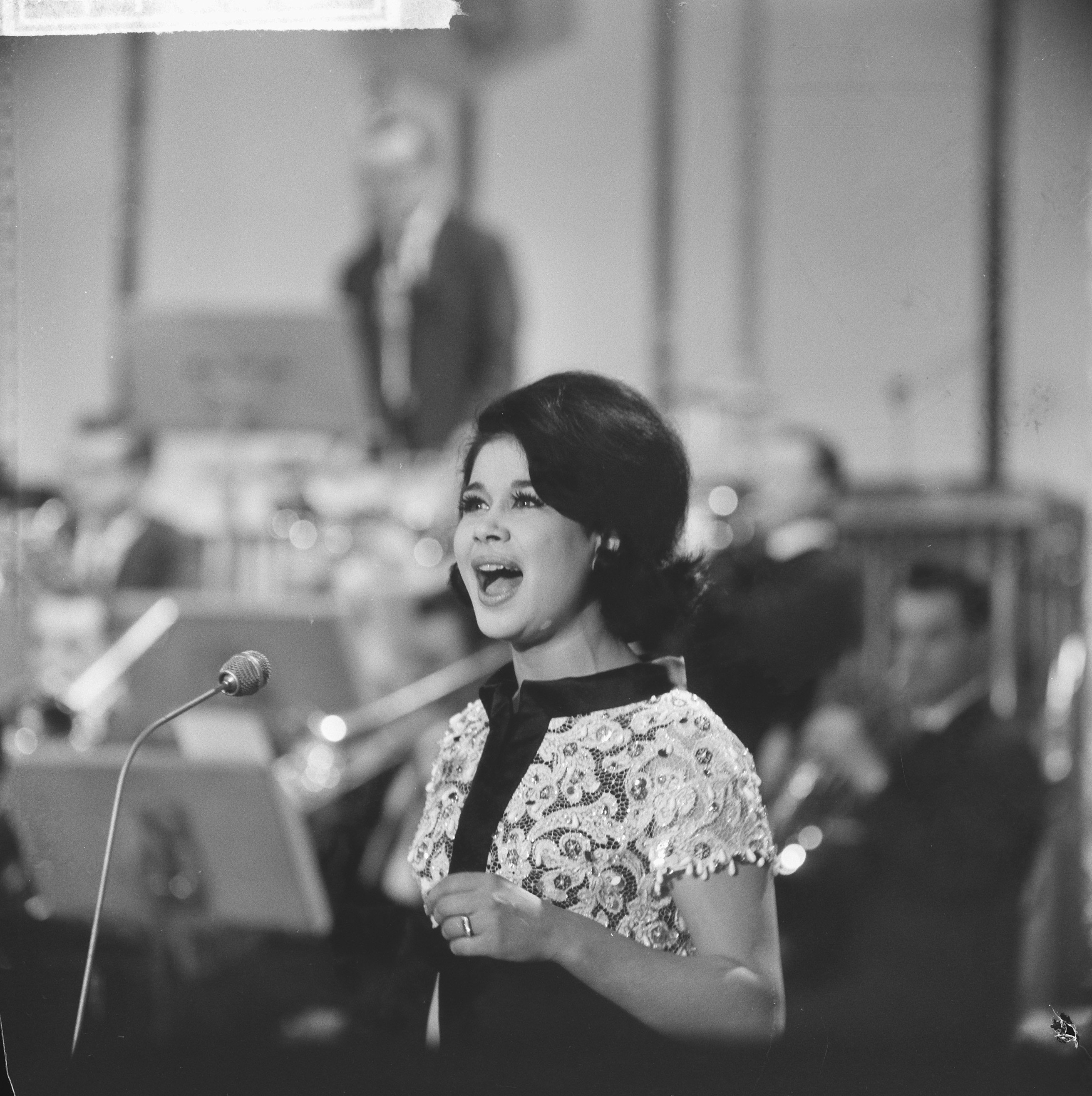 Collectie / Archief : Fotocollectie Anefo Reportage / Serie : [ onbekend ] Beschrijving : Nationaal Songfestival 1964. Anneke Grönloh zingt Datum : 21 februari 1964 Trefwoorden : artiesten, muziek, songfestivals, zangeressen Persoonsnaam : Grönloh, Anneke Fotograaf : Nijs, Jac. de / Anefo Auteursrechthebbende : Nationaal Archief Materiaalsoort : Negatief (zwart/wit) Nummer archiefinventaris : bekijk toegang 2.24.01.03 Bestanddeelnummer : 916-0844